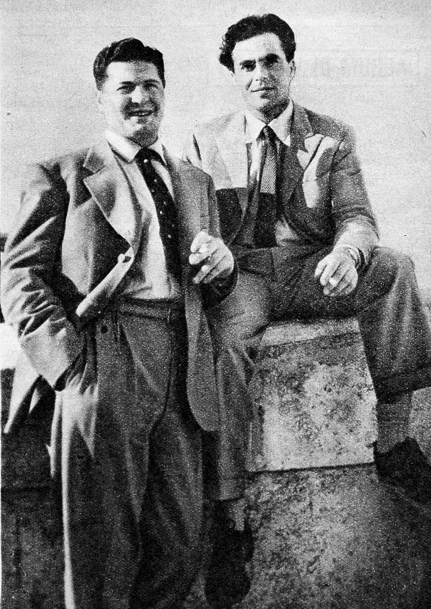 L'attore Ermanno Randi con il convivente Giuseppe Maggiore - Foto tratta da "La Settimana Incom", 1951